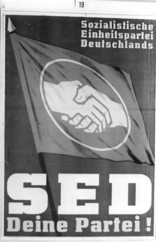 Zentralbild Illus-Köhler 1.11.1950. "Plakate für Aufbau und Frieden". In der Deutschen Akademie der Künste in Berlin wurde am 1.11.1950 eine Ausstellung "Plakate für Aufbau und Frieden 1945 - 1950" eröffnet. UBz: Plakat zu den Gemeindewahlen in Sachsen 1946, von Willi Schubert - Dresden-Hellerau. Herausgeber: Landesverband Sachsen der Sozialistischen Einheitspartei Deutschlands.